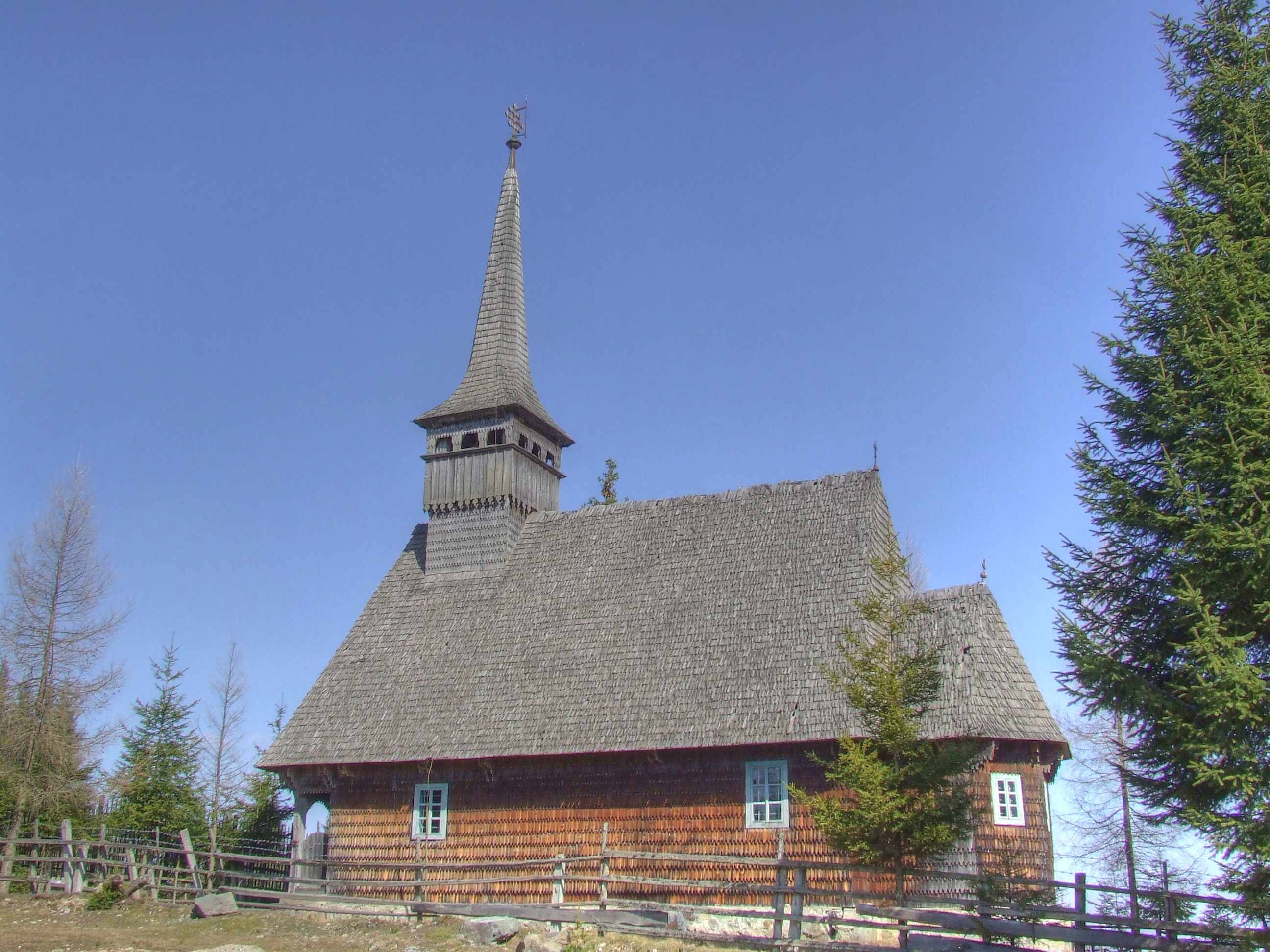 Biserica de lemn din Beliș, județul Cluj